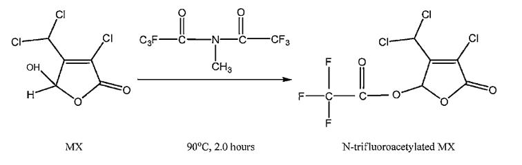 Dérivation du Mutagen X avec du MBTFA